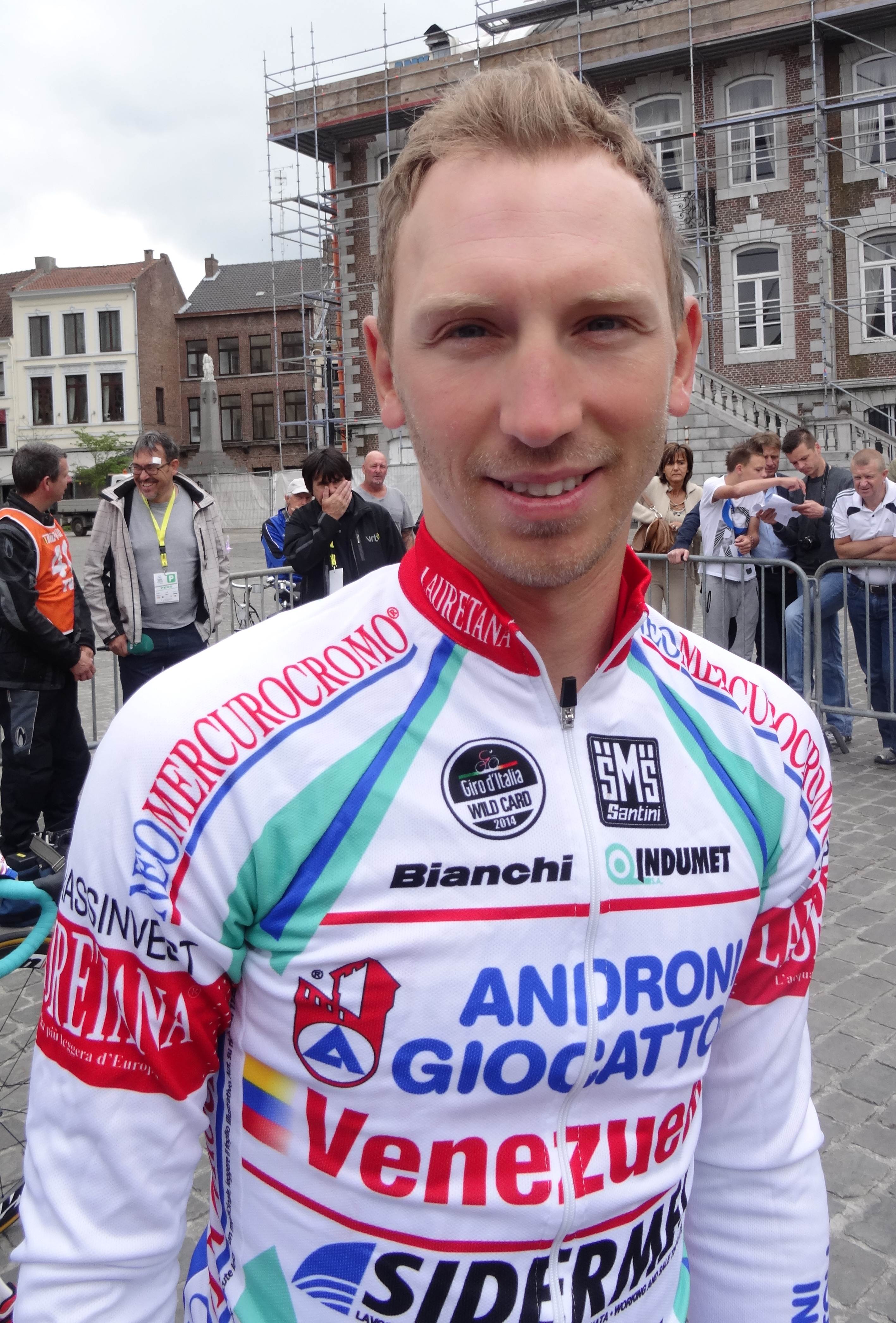 Reportage photographique réalisé le dimanche 15 juin à l'occasion du départ et de l'arrivée du Tour du Limbourg 2014 à Tongres, Belgique.